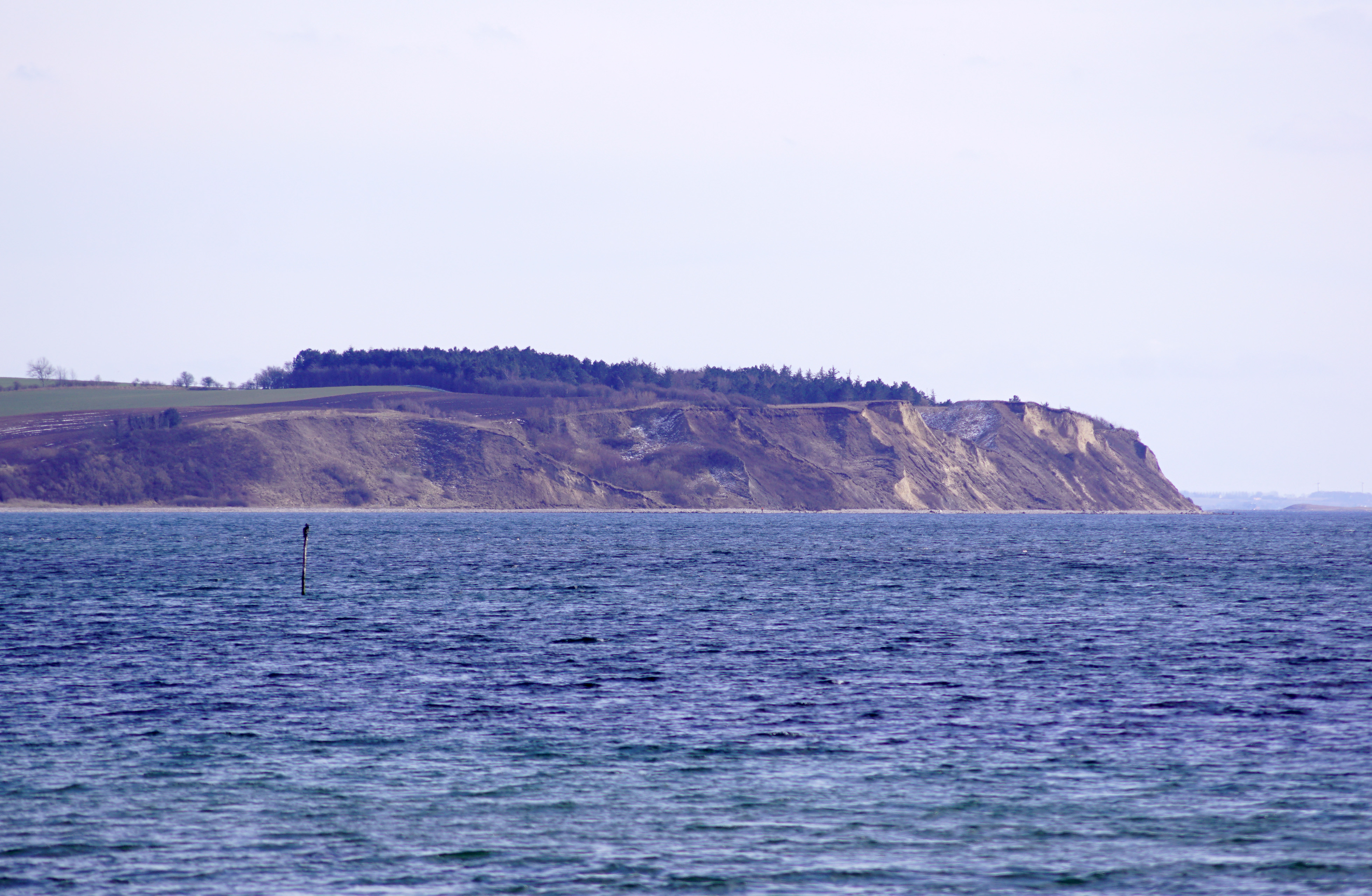 Sønderby Klint set fra Torø